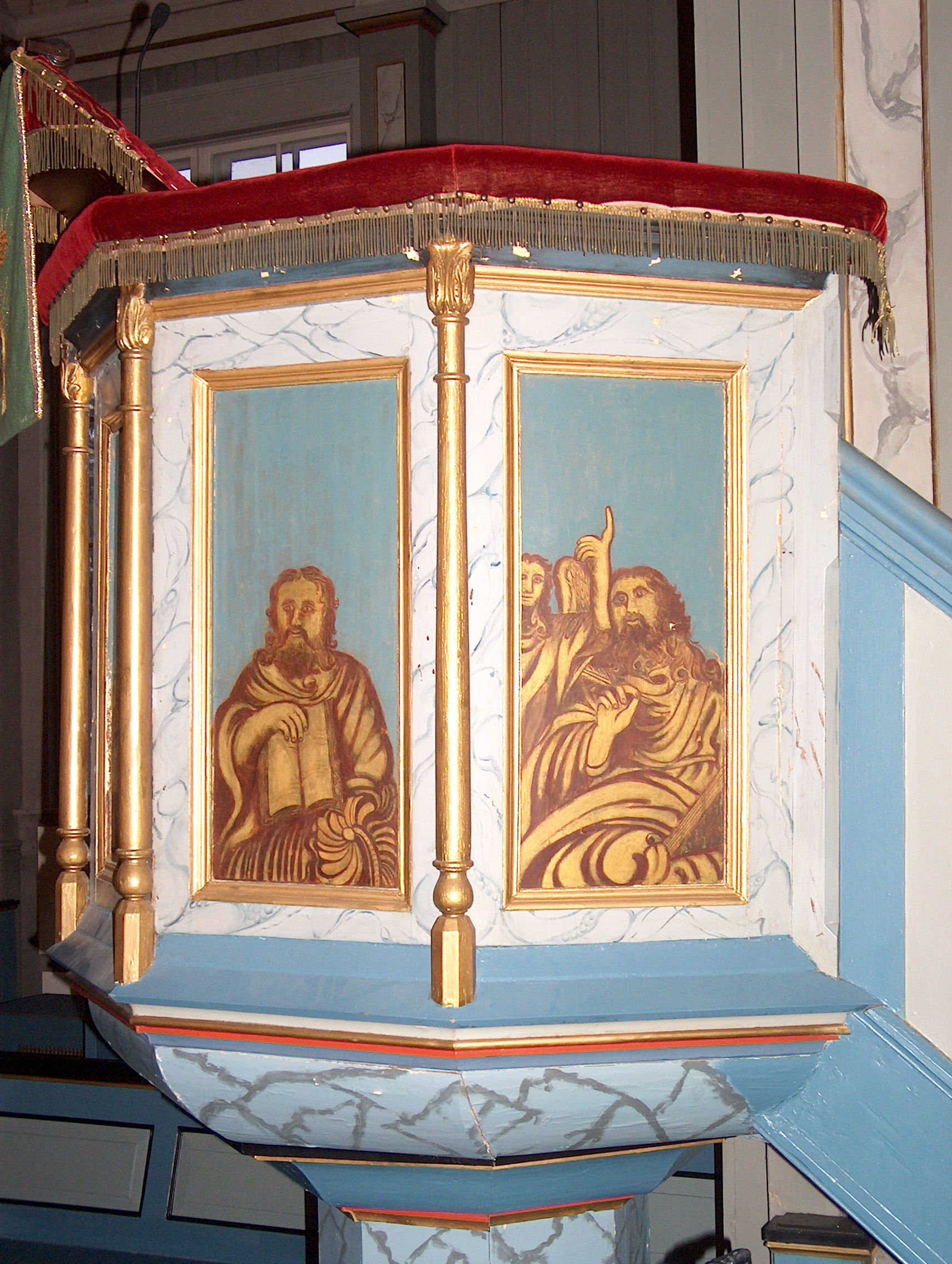 Lunder kirke, Sokna (prekestolen)